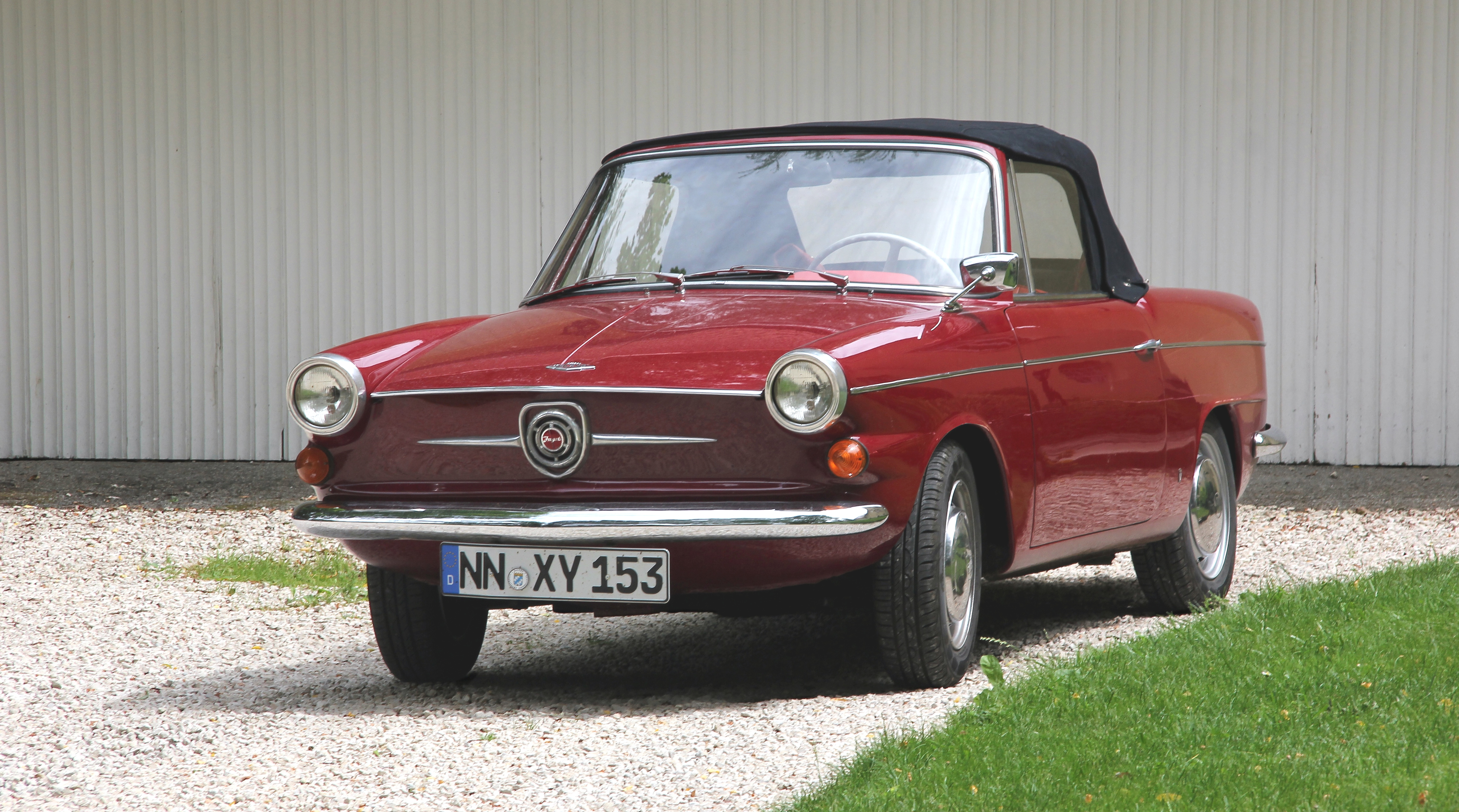 NSU-Fiat Jagst Riviera, Karosserie Vignale; Fantasiekennzeichen